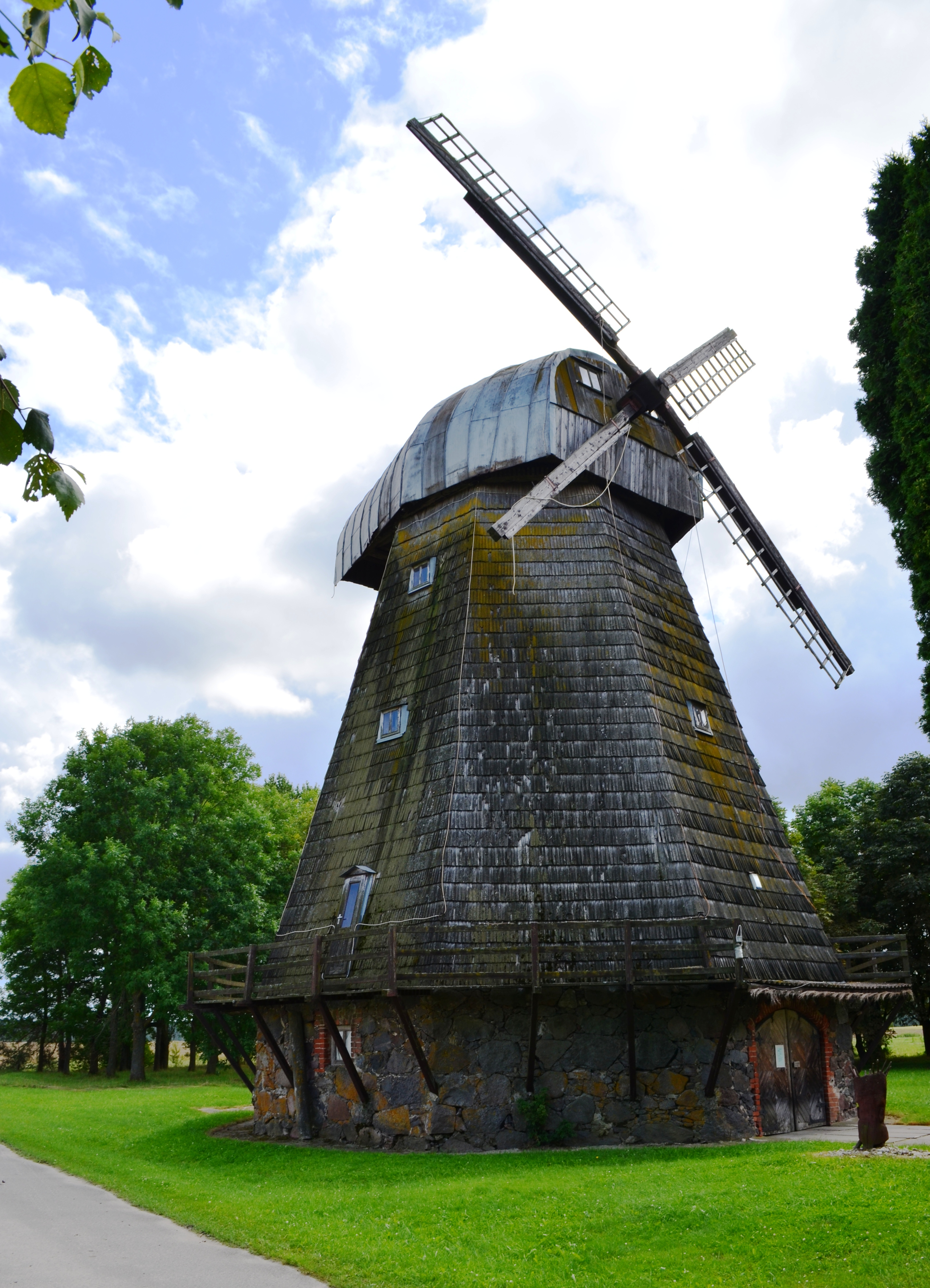 Stultiškių malūnas, Panevėžio raj.